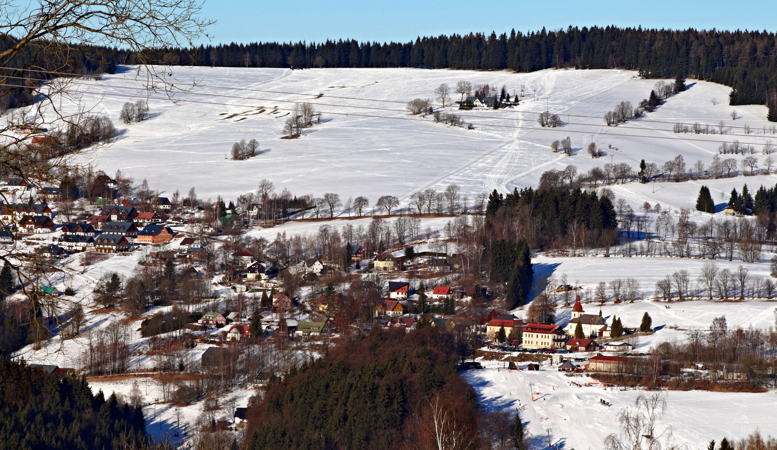 Vítkovice v Krkonoších